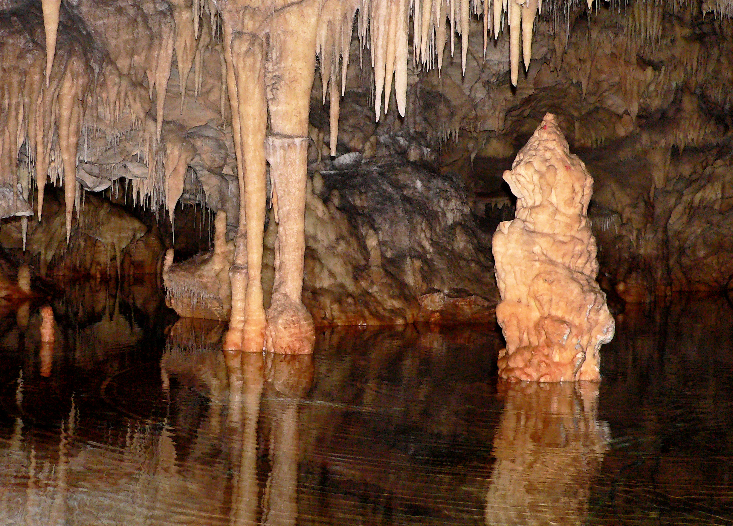 Σπήλαιο Βλυχάδα ή Γλυφάδα«Σπήλαιο Βλυχάδα ή Γλυφάδα»